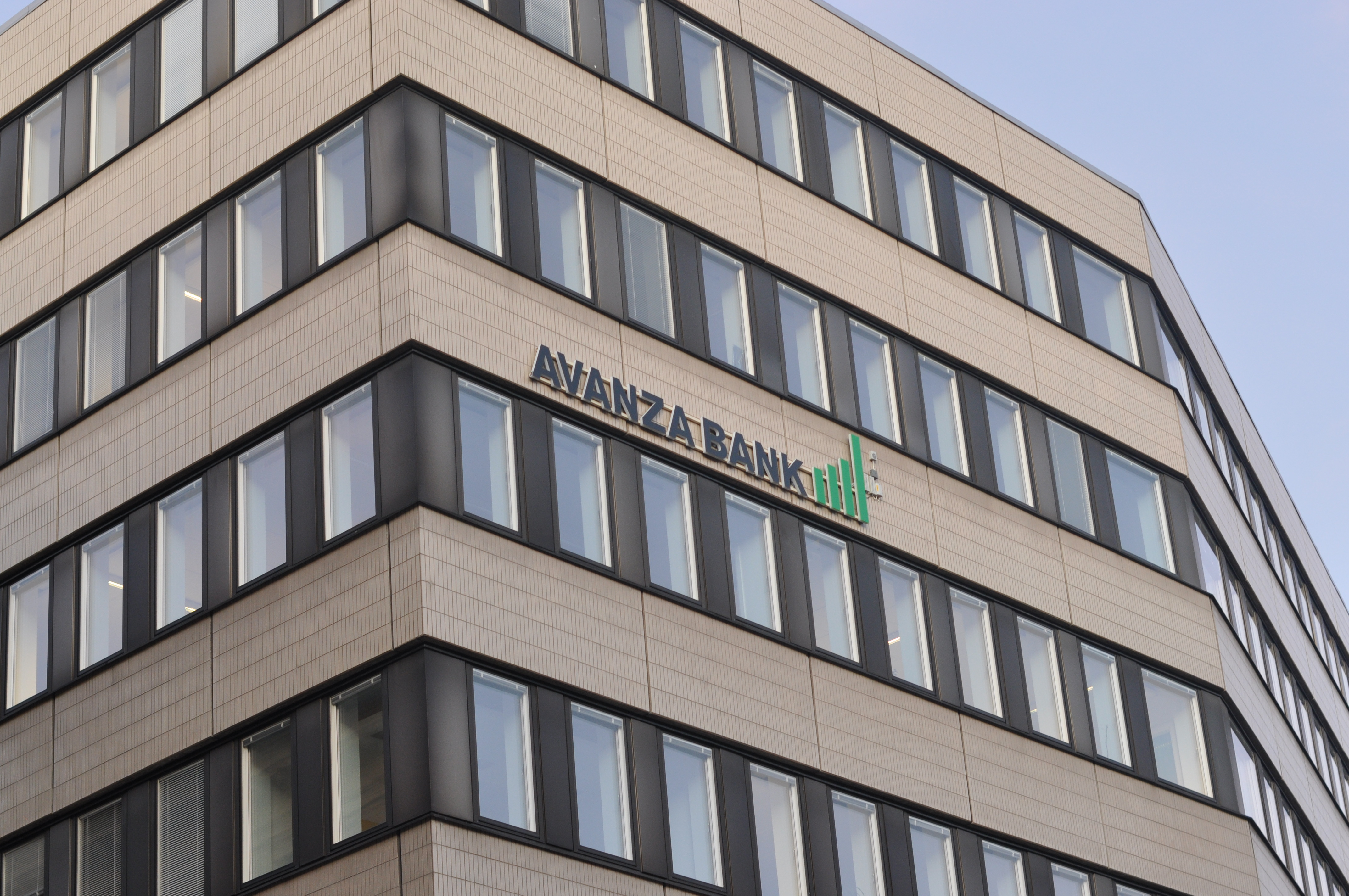 Avanza bank. Höjden 14, Regeringsgatan 103 Stockholm Nybyggnadsår 1971 - 1974 AB Skånska Cementgjuteriet (Arkitektkontor) AB Skånska Cementgjuteriet (Byggmästare) AB Skånska Cementgjuteriet (Konstruktör) Anders Malmsten (Arkitekt) Göran Skallsjö (Arkitekt) Leif Engdahl (Arkitekt) Göran Skallsjö signerade den första omgången ritningar i bygglovet, Engdahl och Malmsten ändringsritningar.